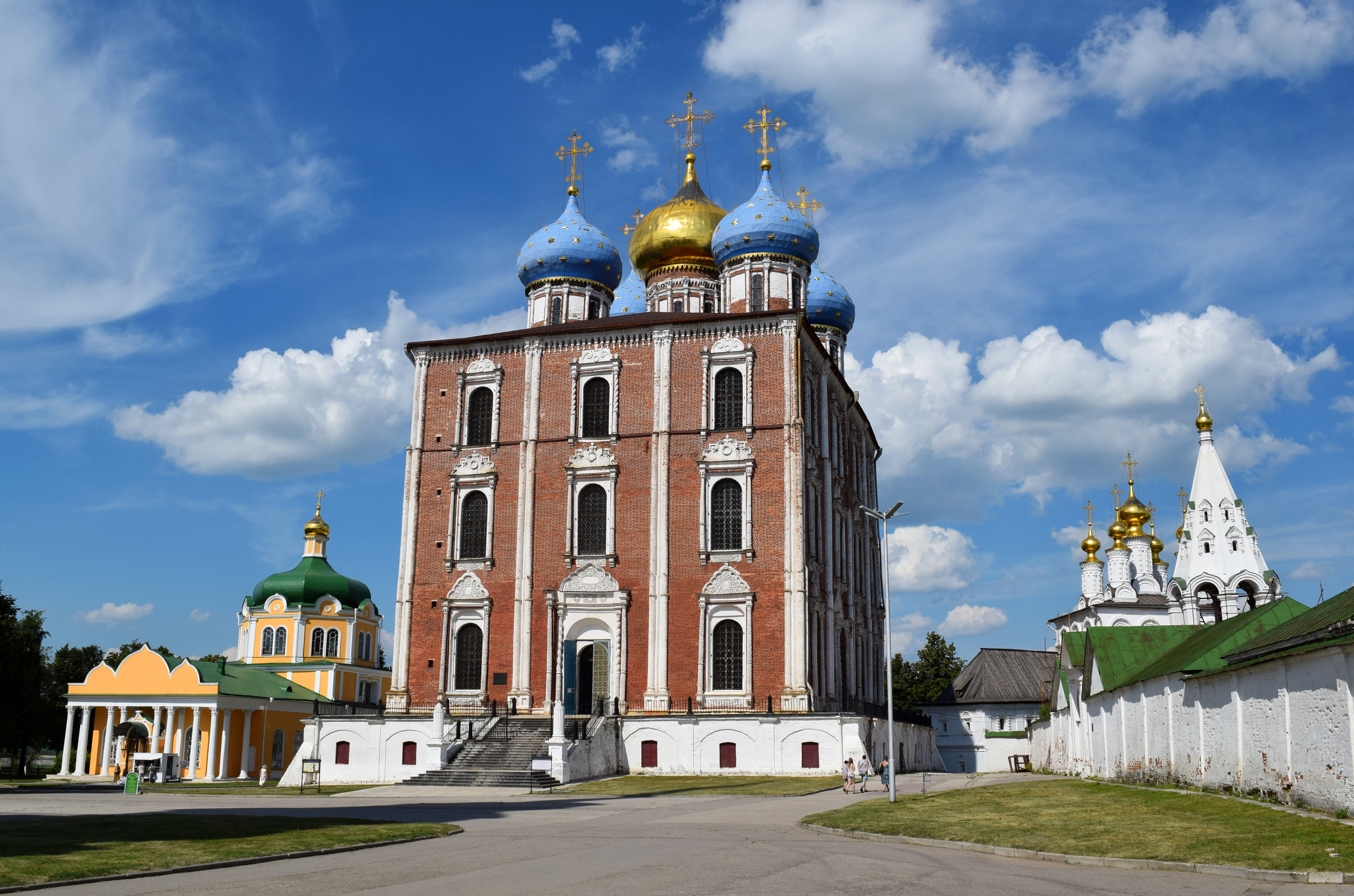 Главный кафедральный собор г. Рязани